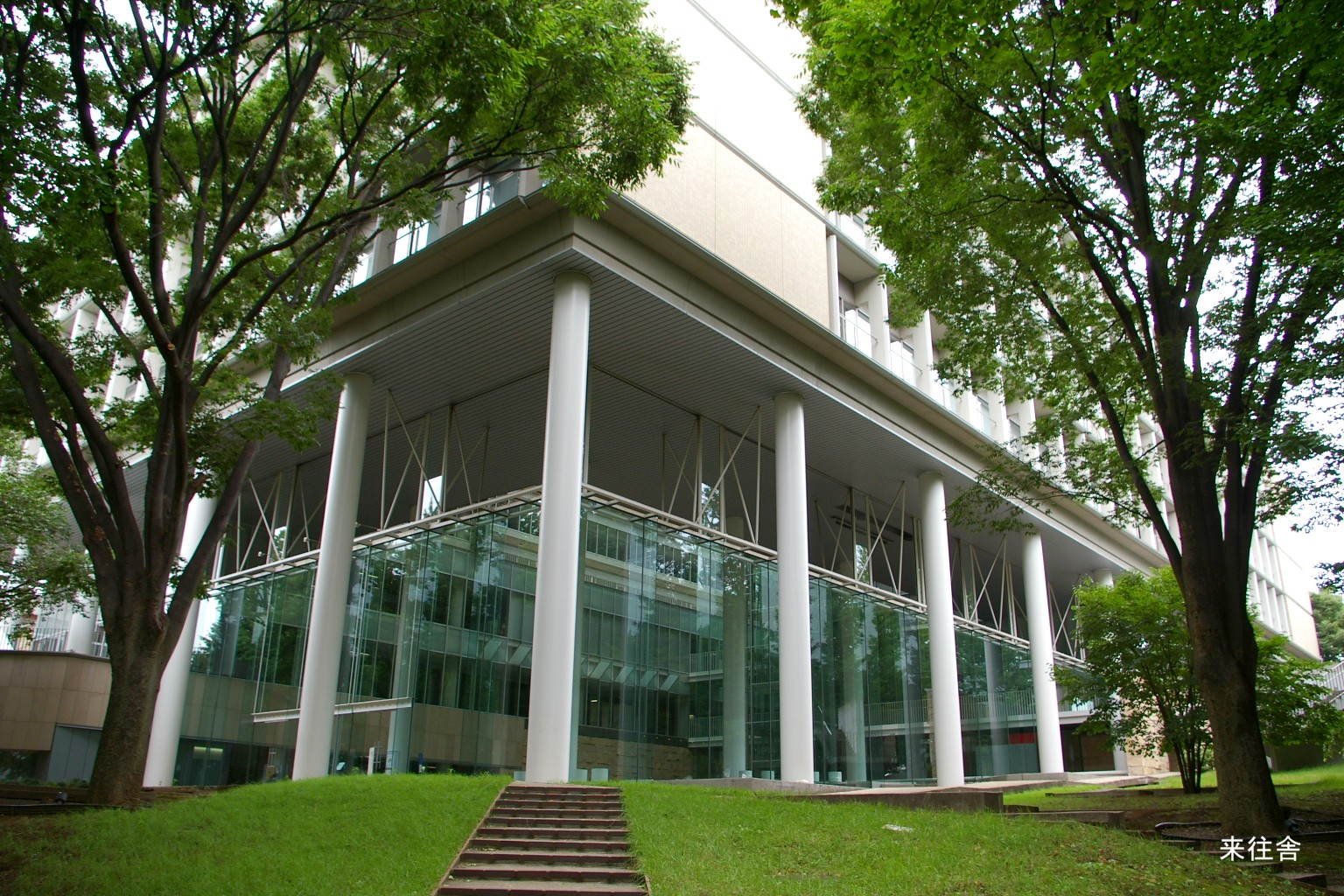 2009.5日本国内で塾生 (talk)が撮影。